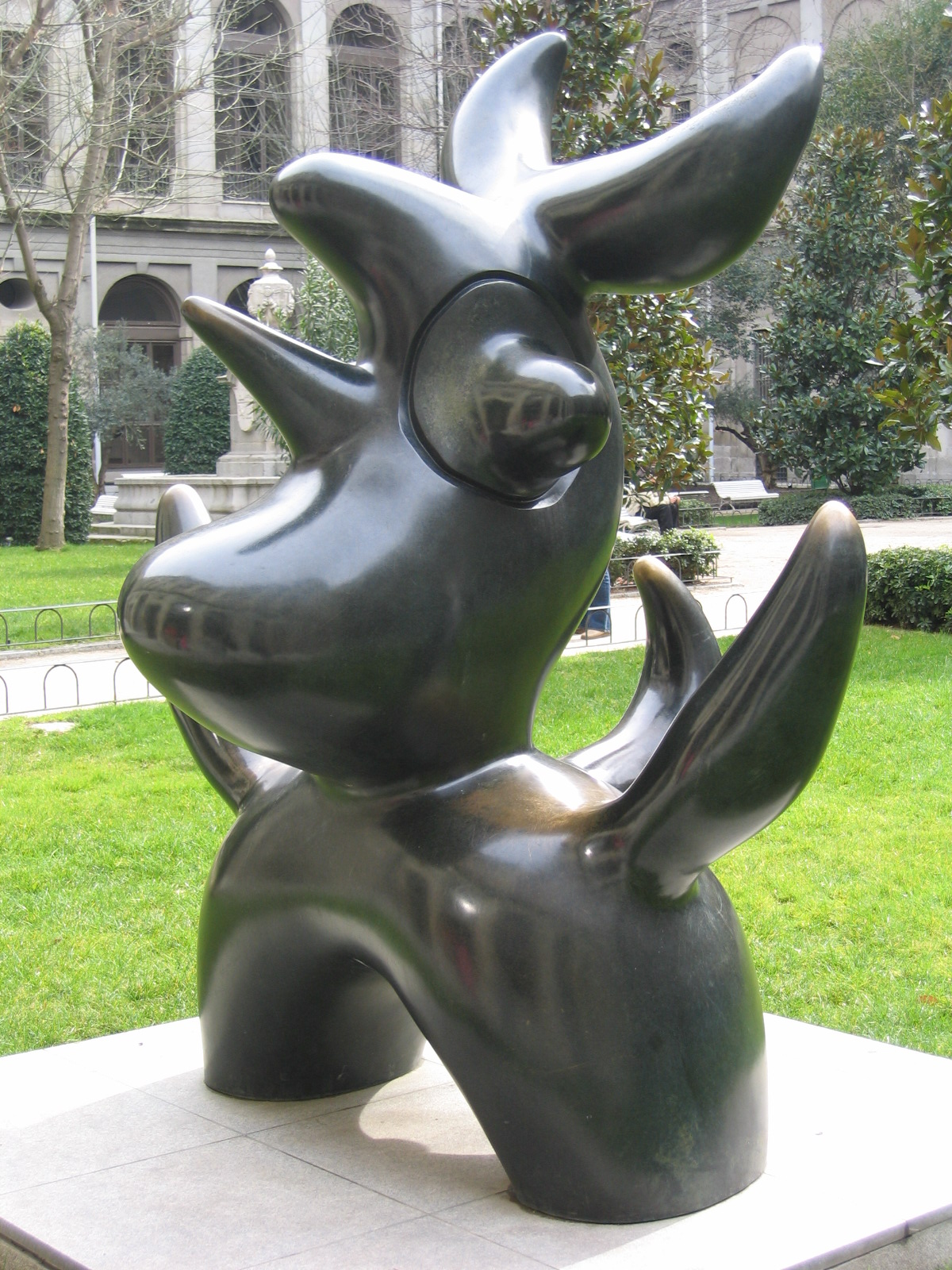 Oiseau lunaire (Pájaro lunar) (1966), escultura de Miró en el patio del Museo Nacional Centro de Arte Reina Sofía de Madrid (España)